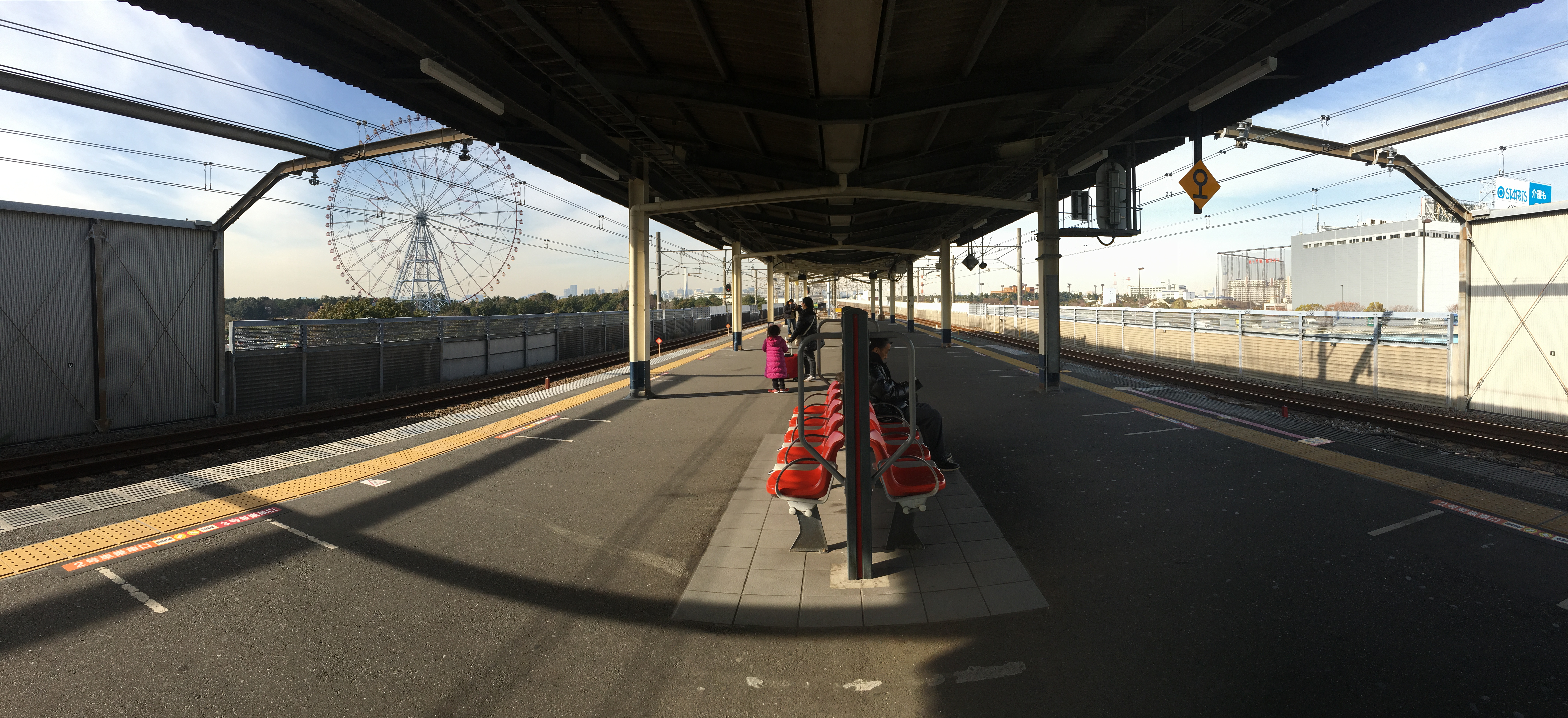 JR京葉線の葛西臨海公園駅のホーム (JR Keiyō Line, Kasai-Rinkai Park Station platforms)